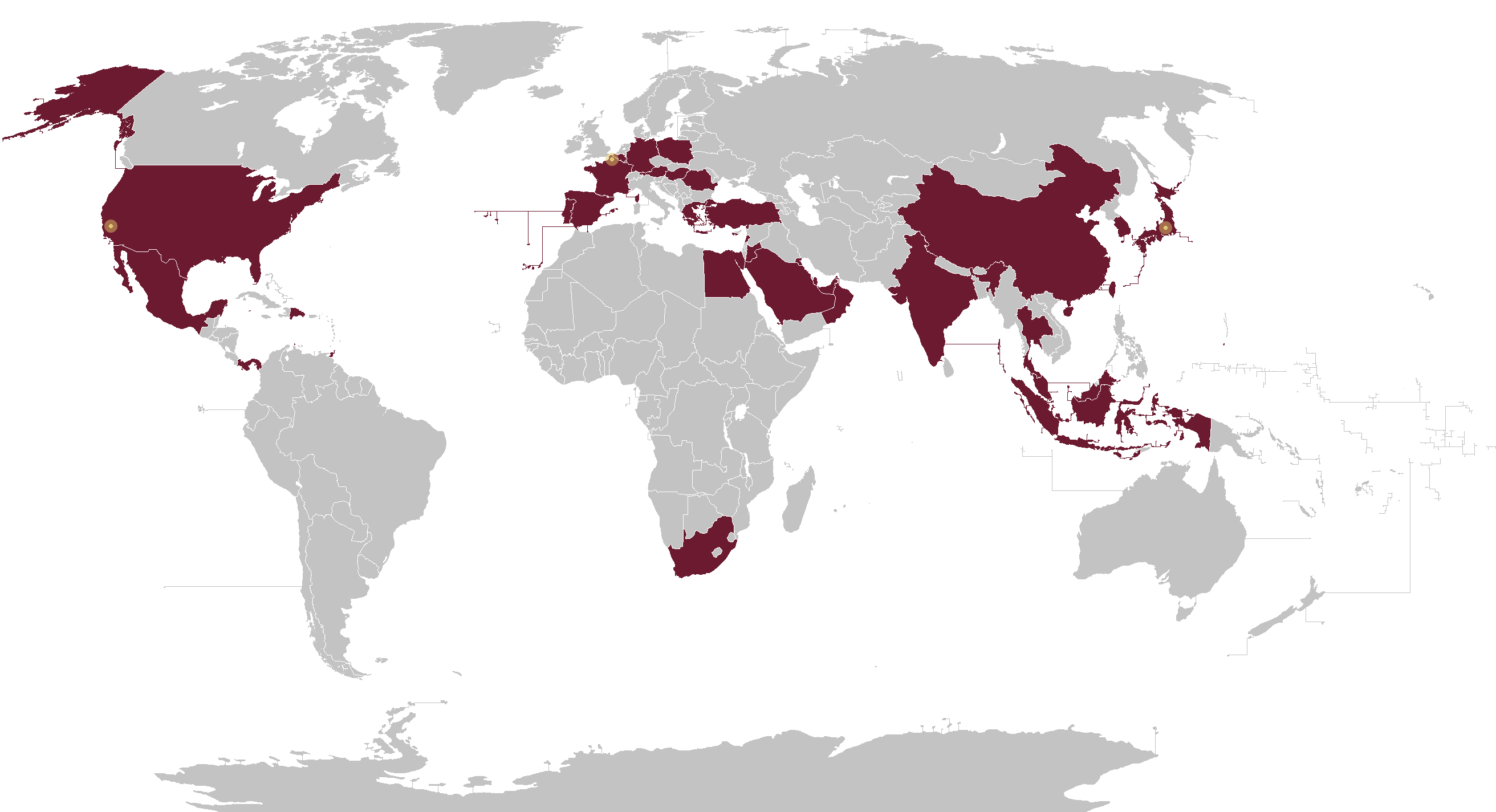 Carte des pays d'implantation des boutiques (en violet) et des sites de production (points jaunes France, Japon, Etats-Unis) Häagen-Dazs dans le monde en 2018.